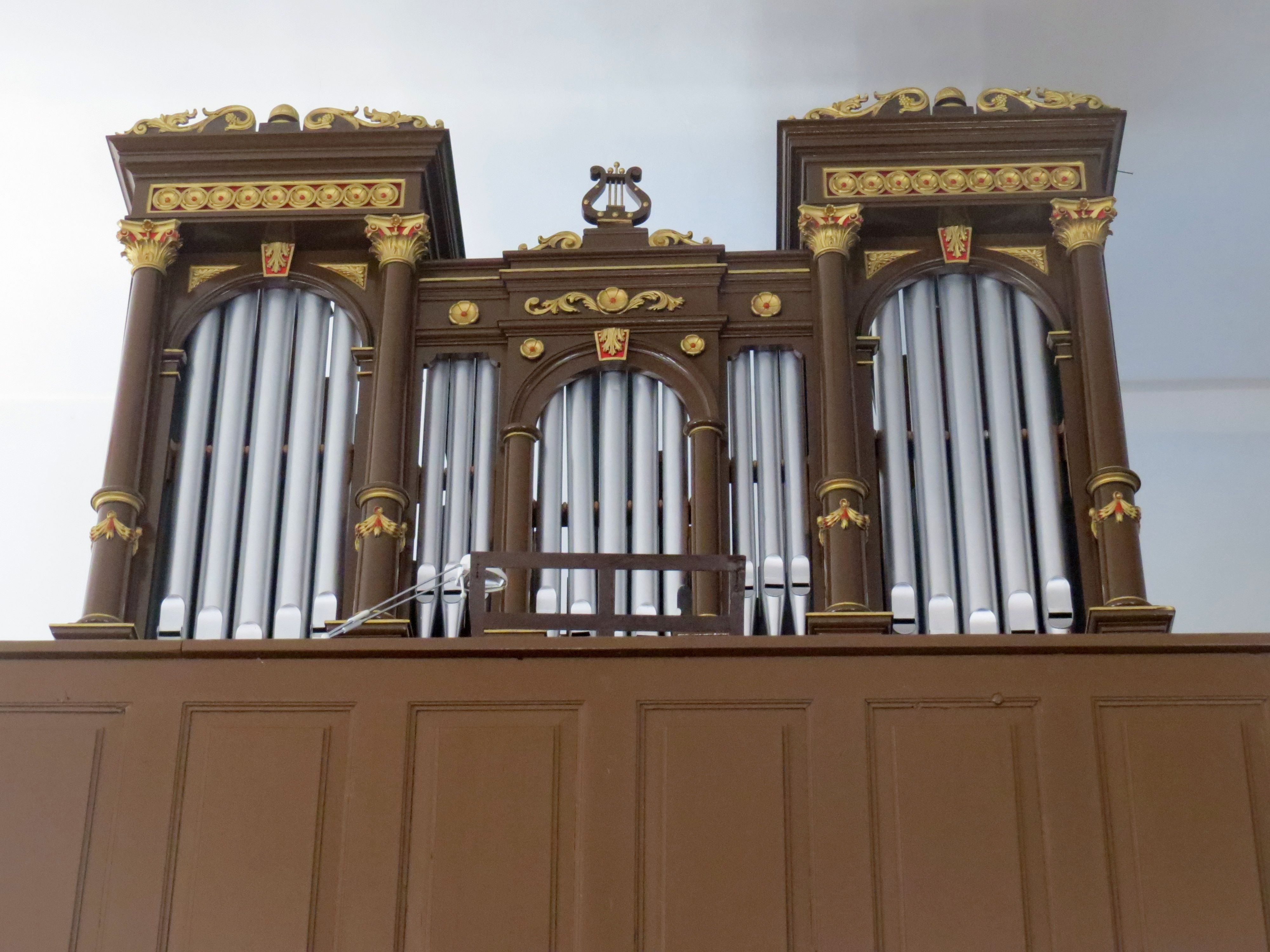 A cigándi református templom főbejáratával szembeni karzaton látható, az 1907-ben Pécsről hozott 2 regiszteres orgona, melyet Angster József készített. 1989-ben és 2003-ban felújították